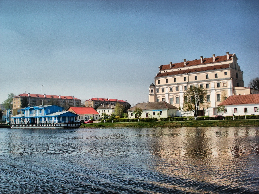 Беларуская (тарашкевіца): Будынак былога калегіюма езуітаў. г. Пінск This is a photo of Belarusian heritage monument. Reference number: 112Г000536 ( WLM)